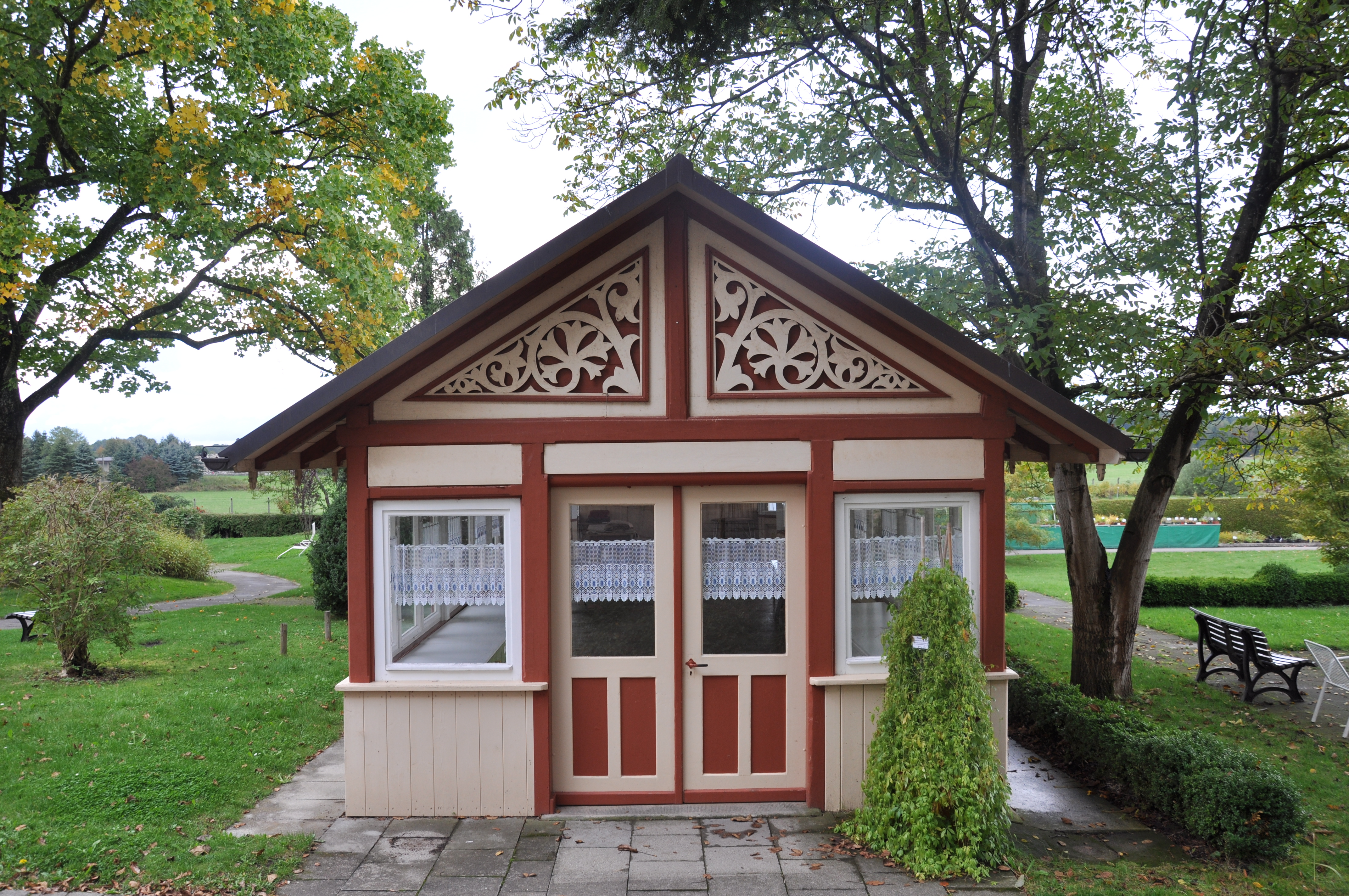 Bad Waldsee, Kloster Reute, Gartenpavillon